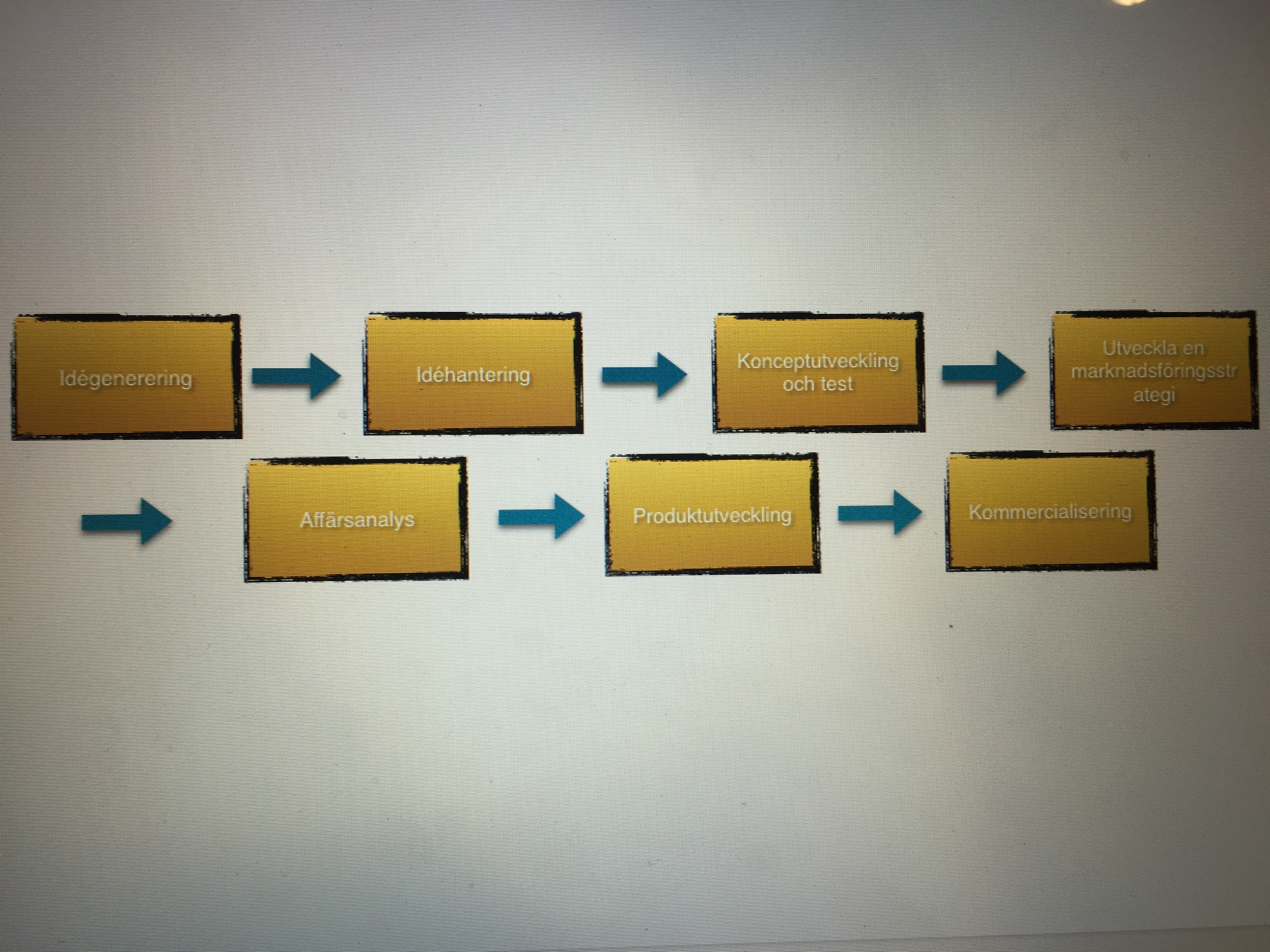 De olika stegen i produktutveckling. Skapades hemma via pages 27 oktober 2016